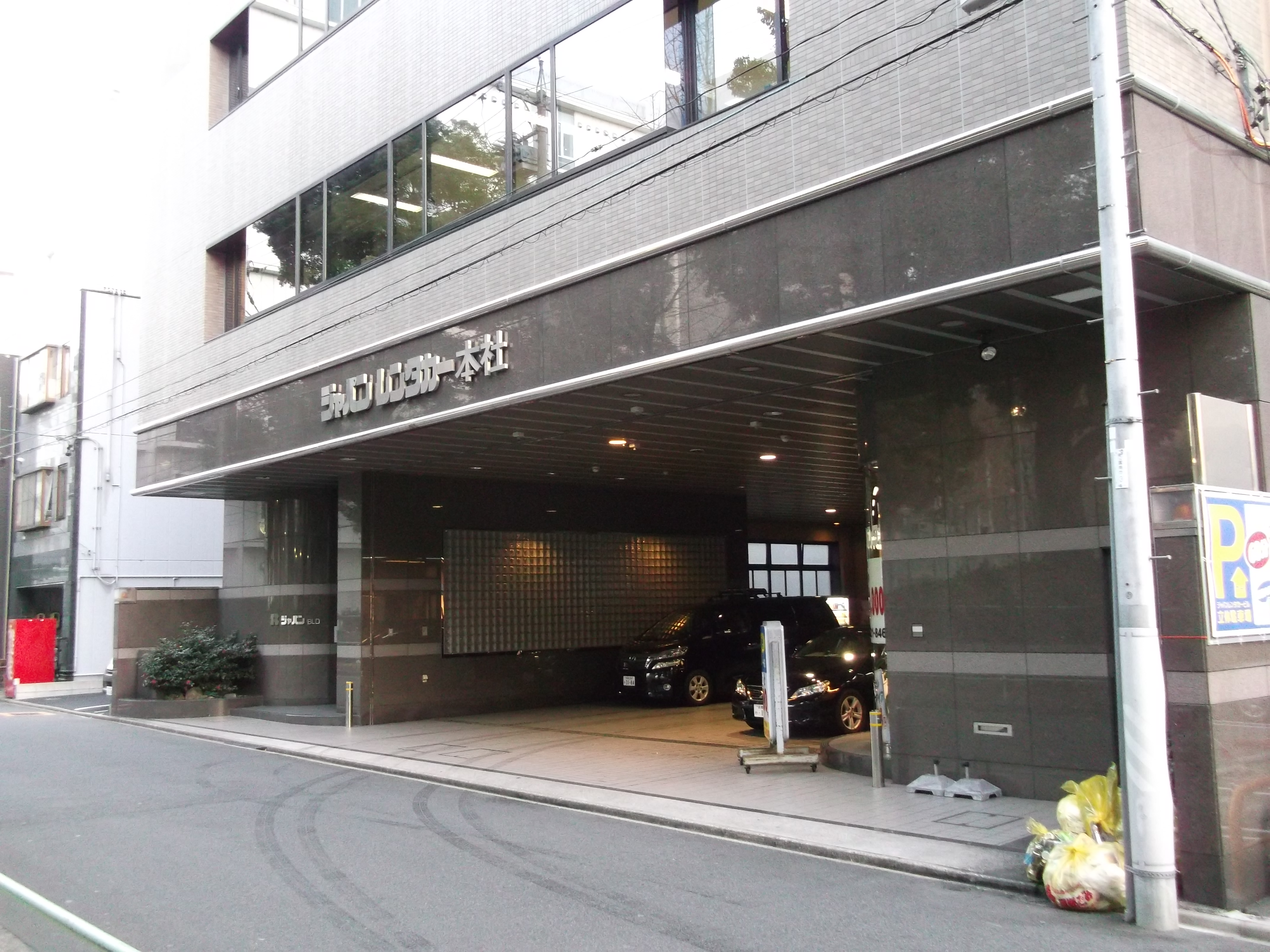 名古屋市中区栄にあるジャパンレンタカー本社を北西から写す。